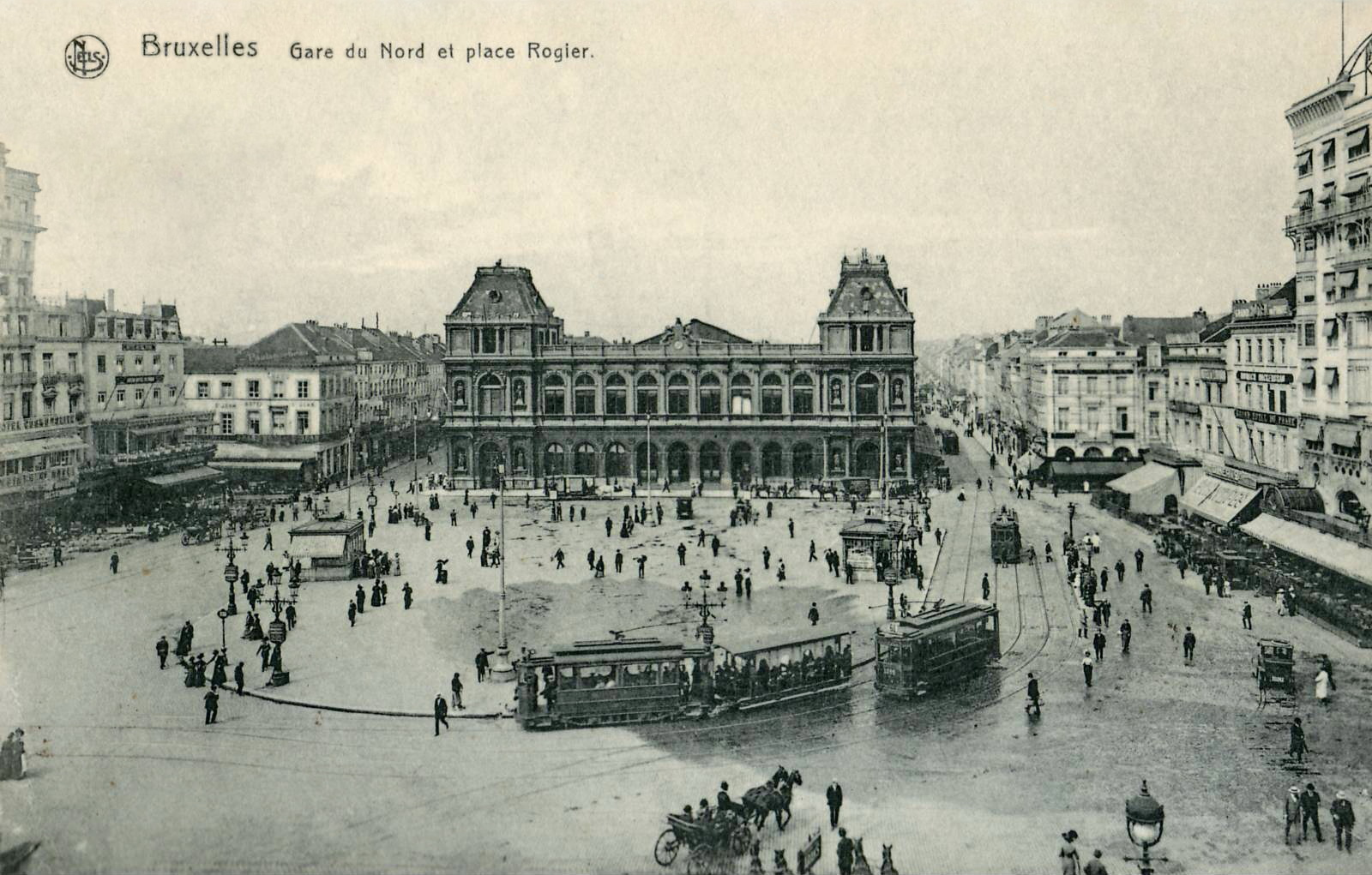 Carte postale ancienne éditée par Nels :BRUXELLES - Gare du Nord et Place Rogier